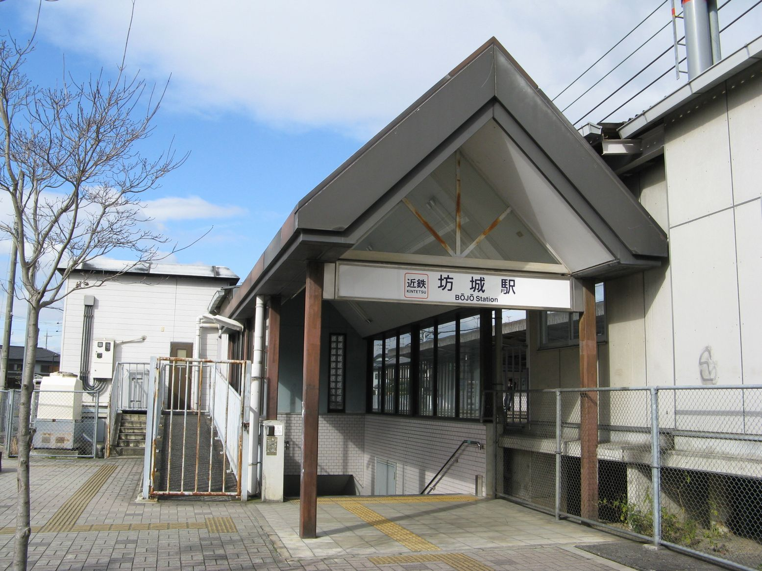 坊城駅 南出口